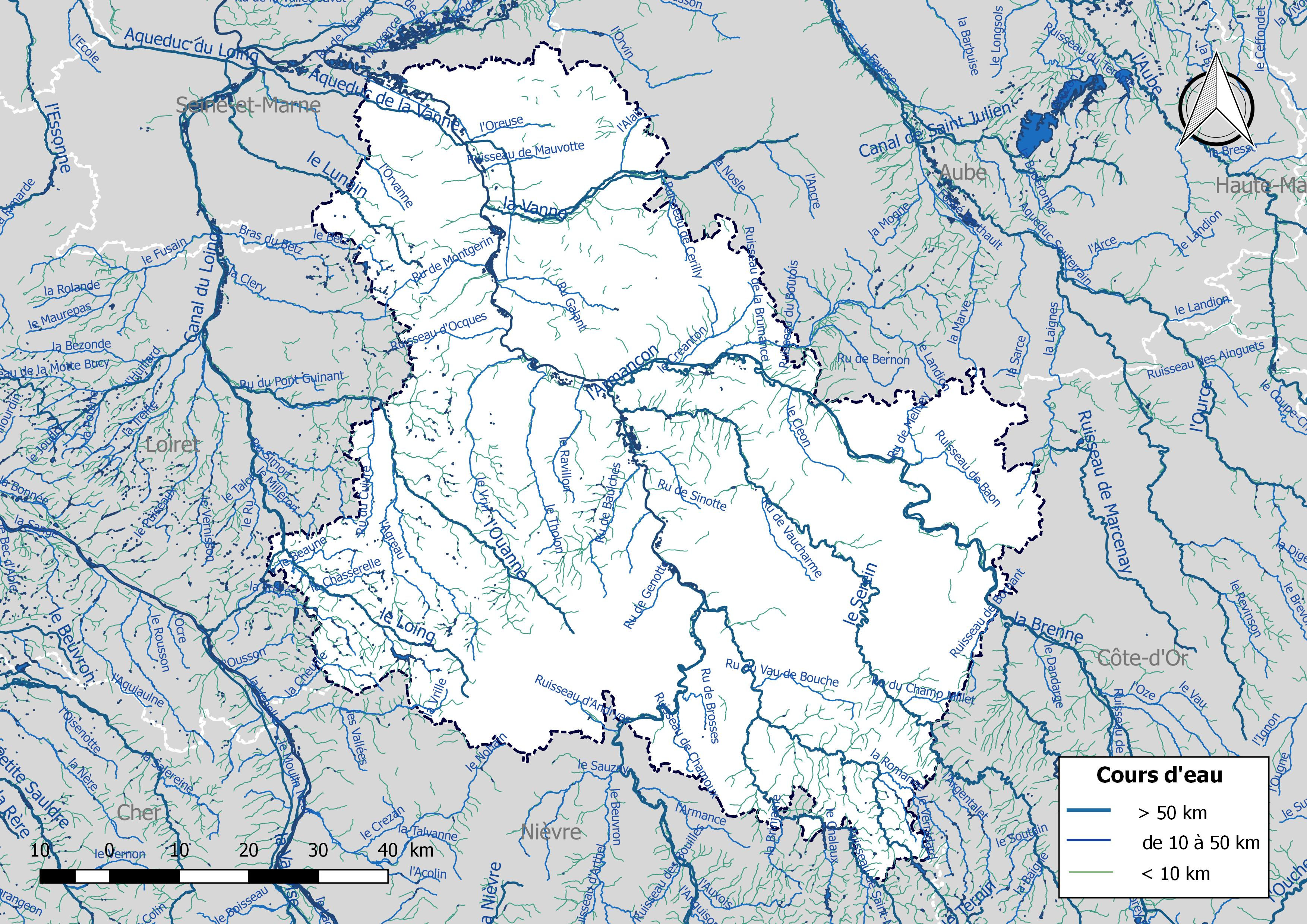 Réseau hydrographique du département de l'Yonne (France).